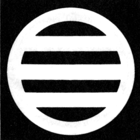 丸に三つ引両